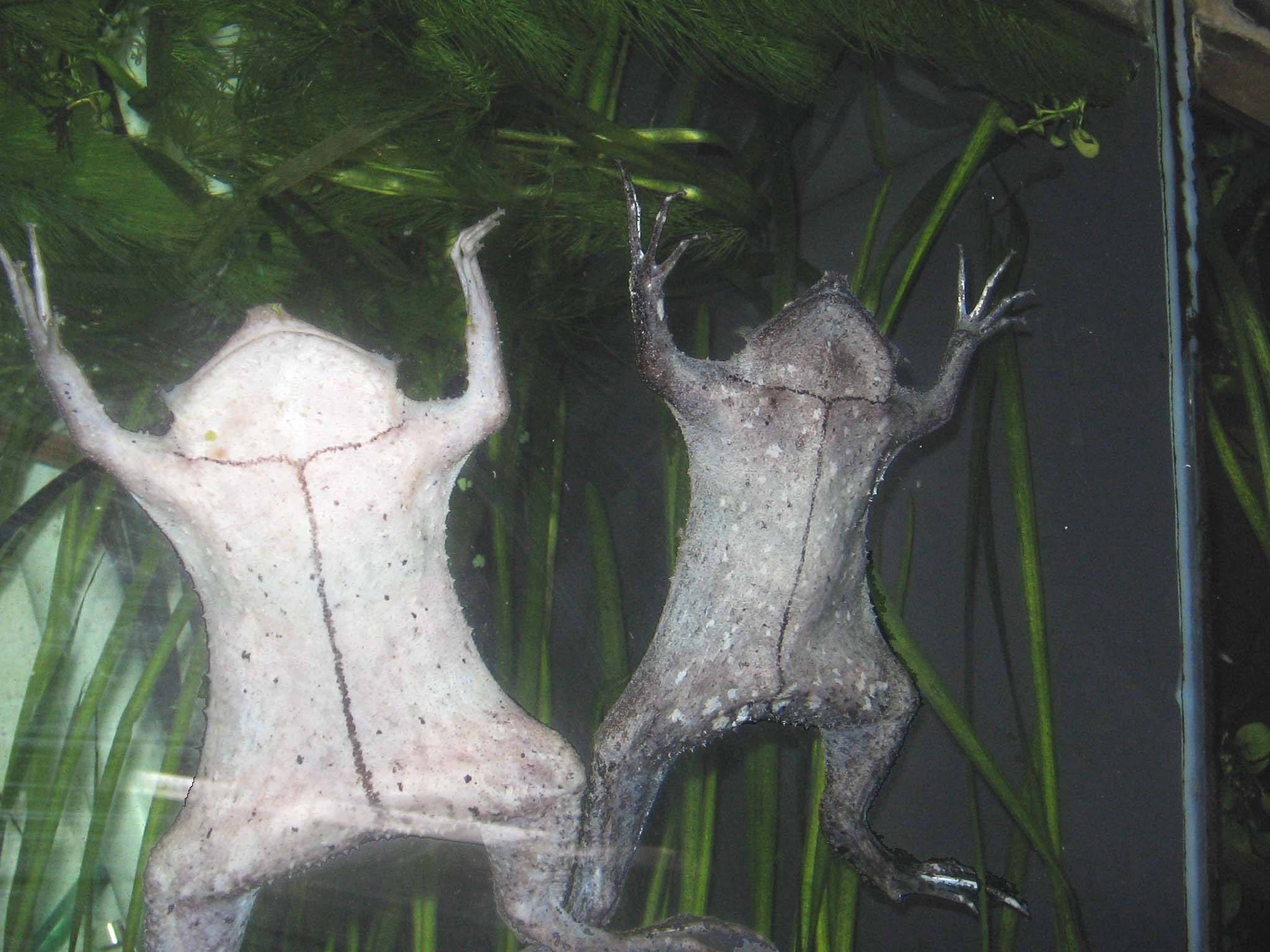 Pipa pipa